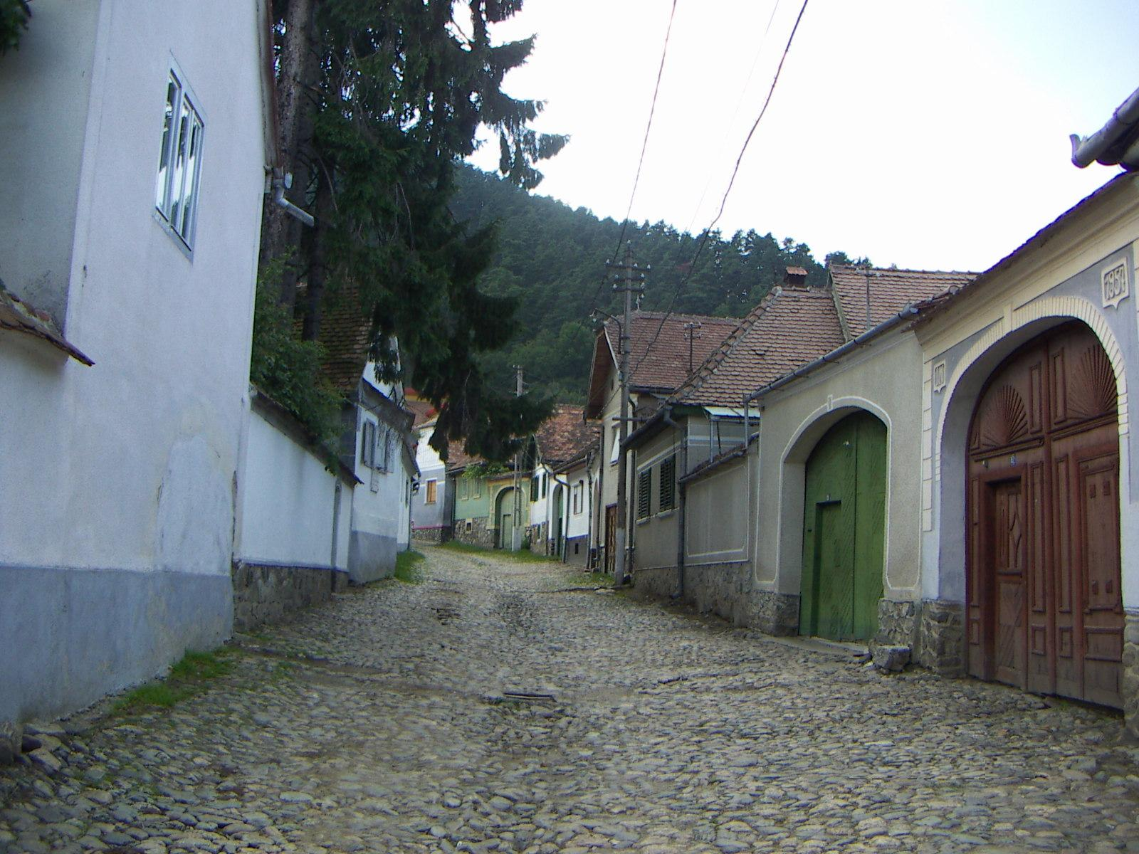 Răşinari, Sibiu, 20.07.2005